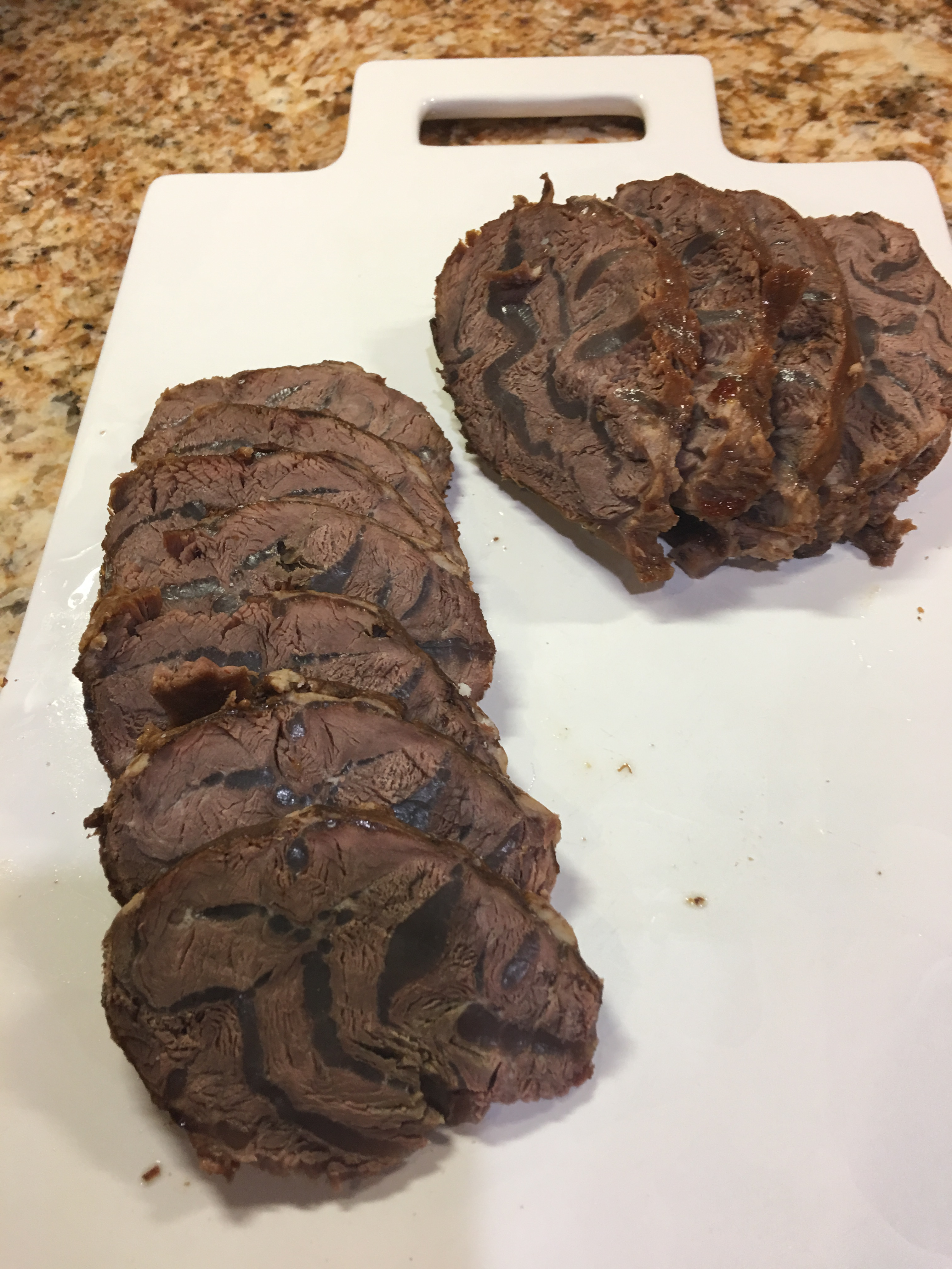 中文（中国大陆）: 卤味牛腱切片